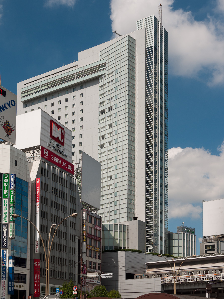 渋谷マークシティ・イースト（エクセル東急ホテル）、東京都渋谷区道玄坂2丁目。